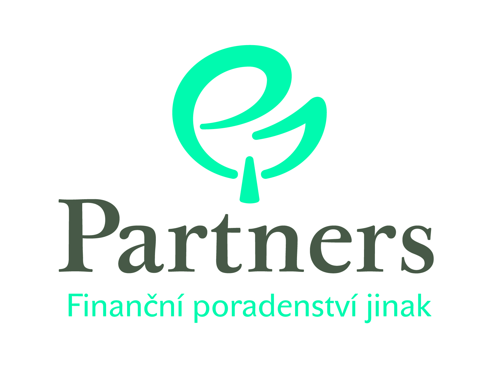 Logo společnosti Partners Financial Services, a.s.